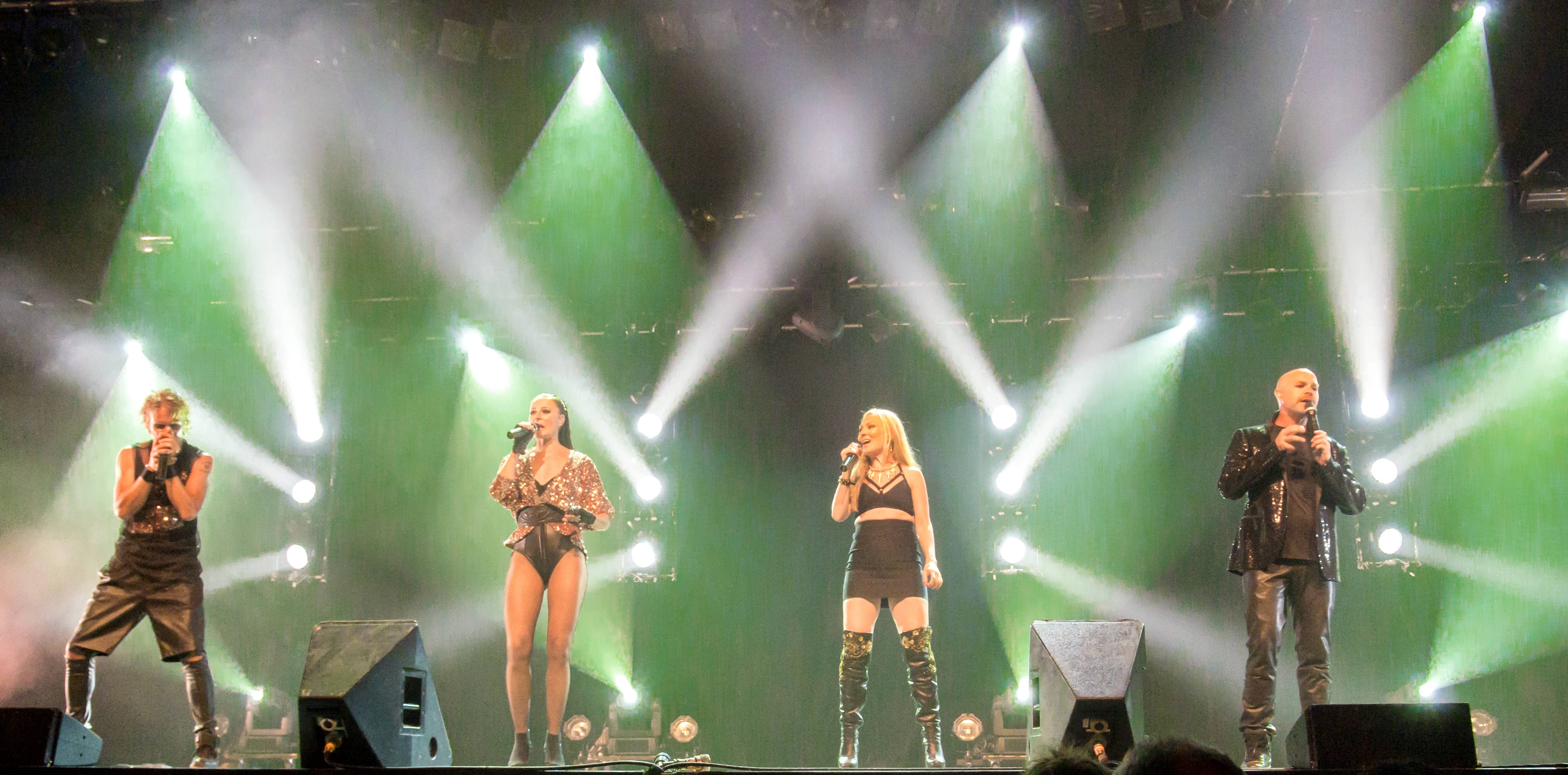 Bilder vom ZMF 2015, die Gala FORK am 15. Juli 2015